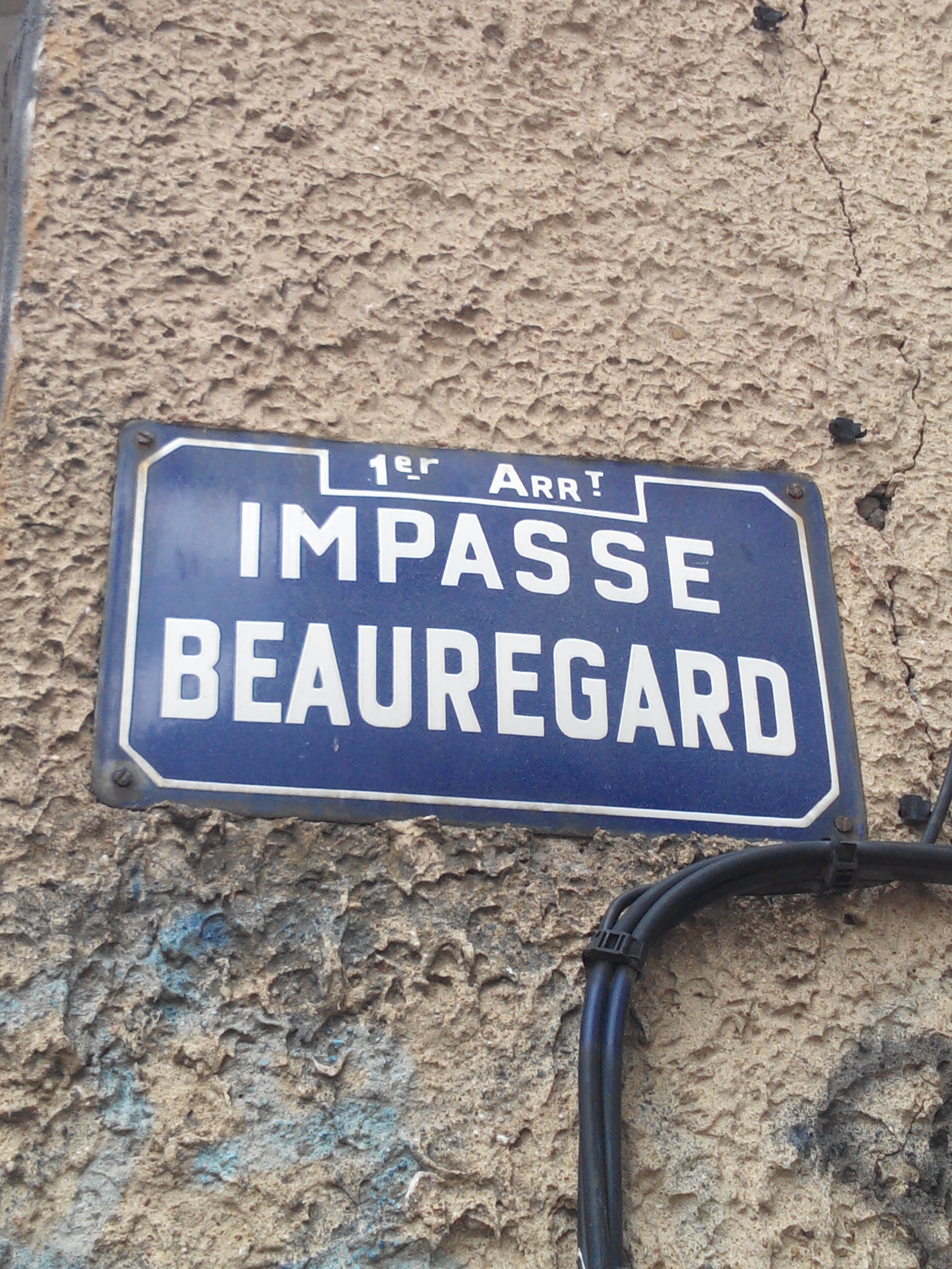 Plaque de l'impasse Beauregard, dans le 1er arrondissement de Lyon.